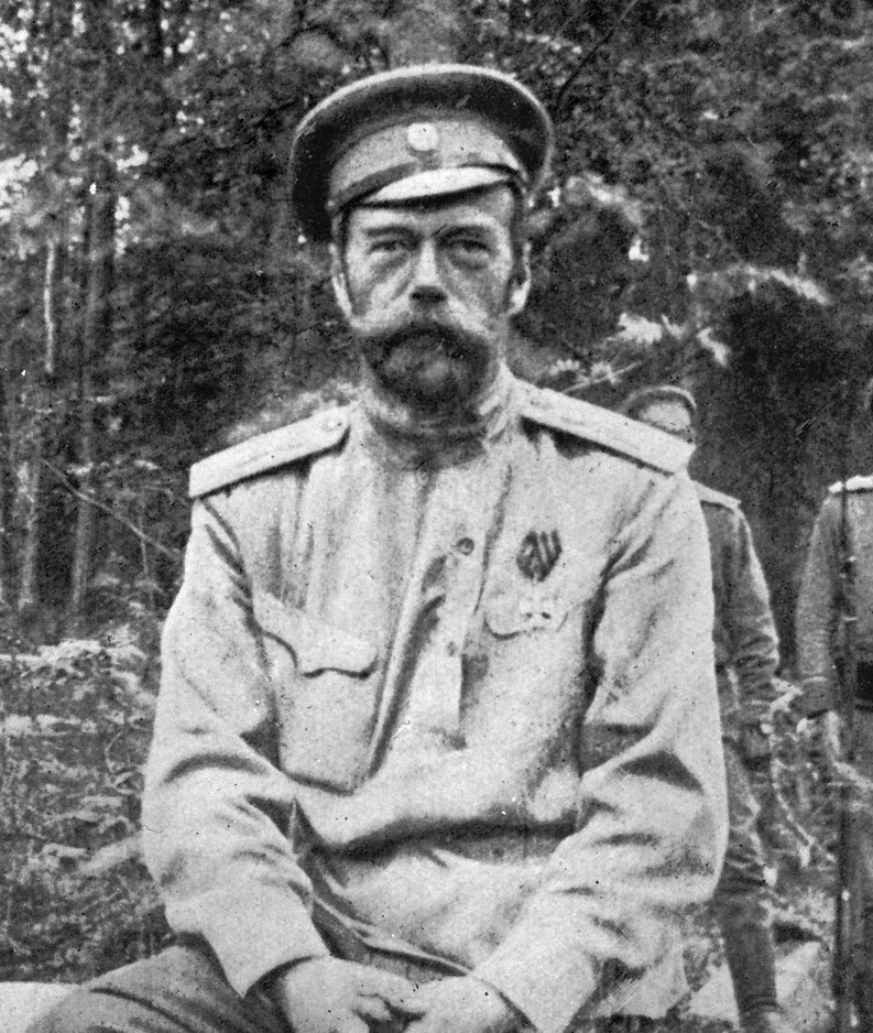 Nicholas II, former Tsar of Russia, taken after his abdication in March 1917.